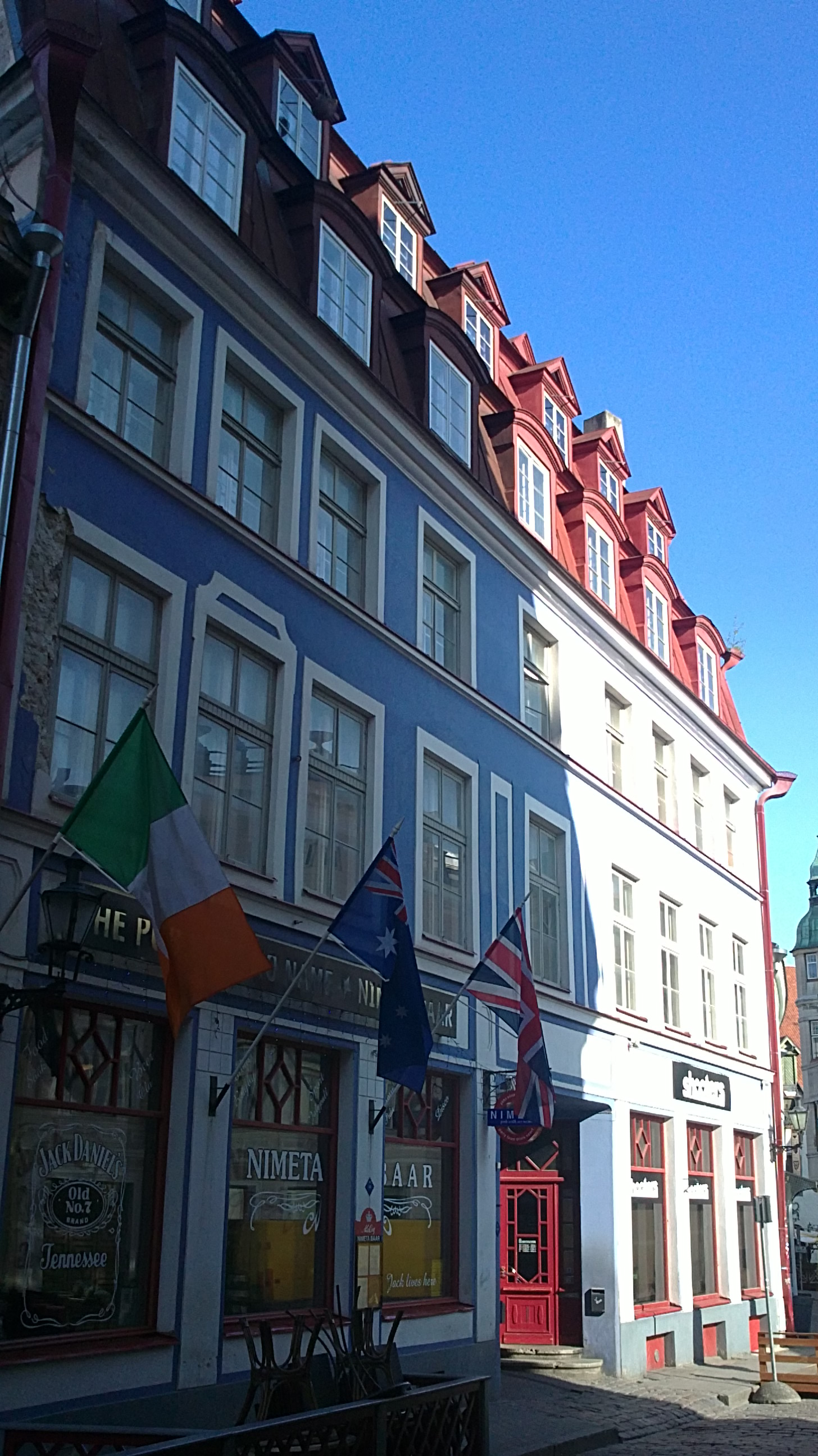 Hoone, Tallinna vanalinnas Suur-Karja tänav 4